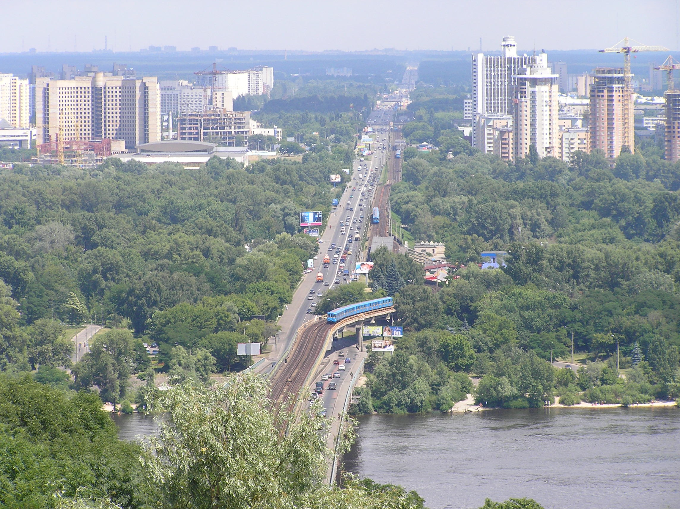 Swiatoshynsko-Browarska Linie